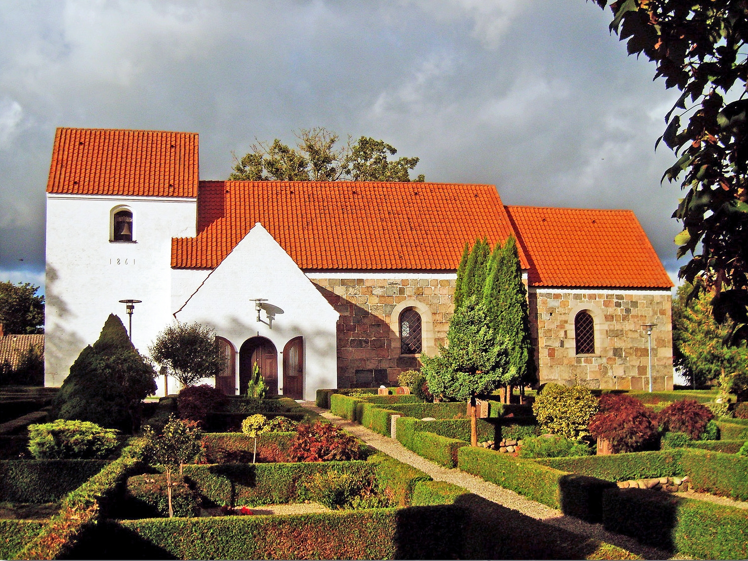 fra syd